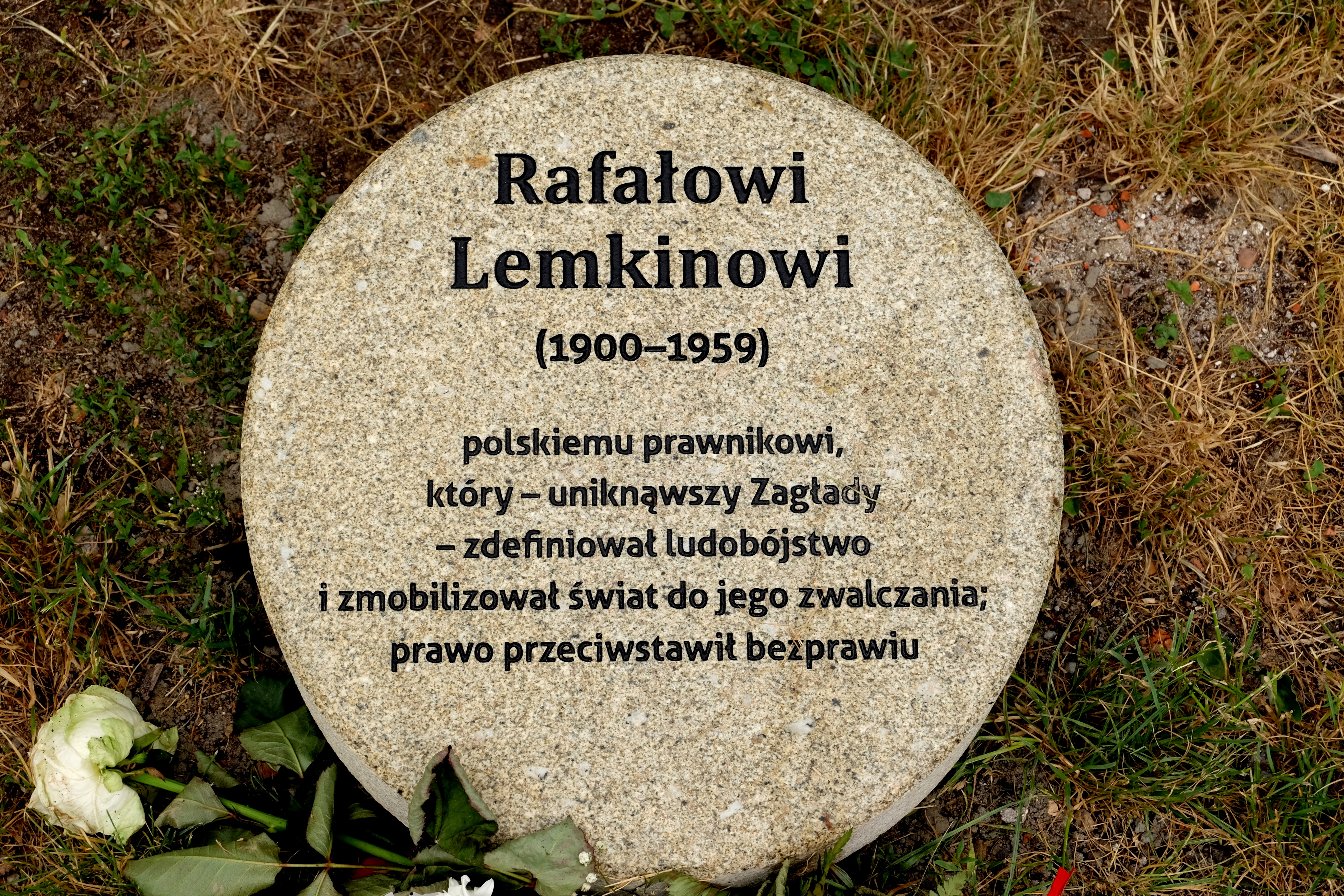 Obelisk upamiętniający Rafała Lemkina w Ogrodzie Sprawiedliwych w Warszawie